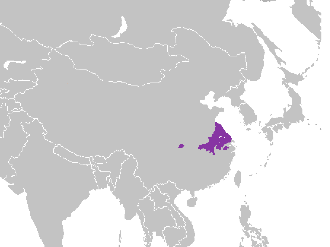 Mandarín jianghuai